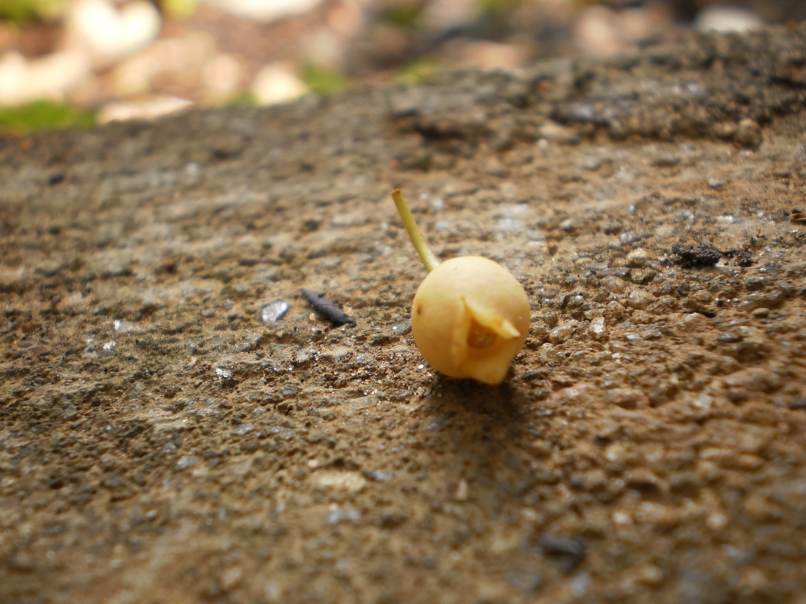 ജാതിമരത്തിന്റെ പൂവ്